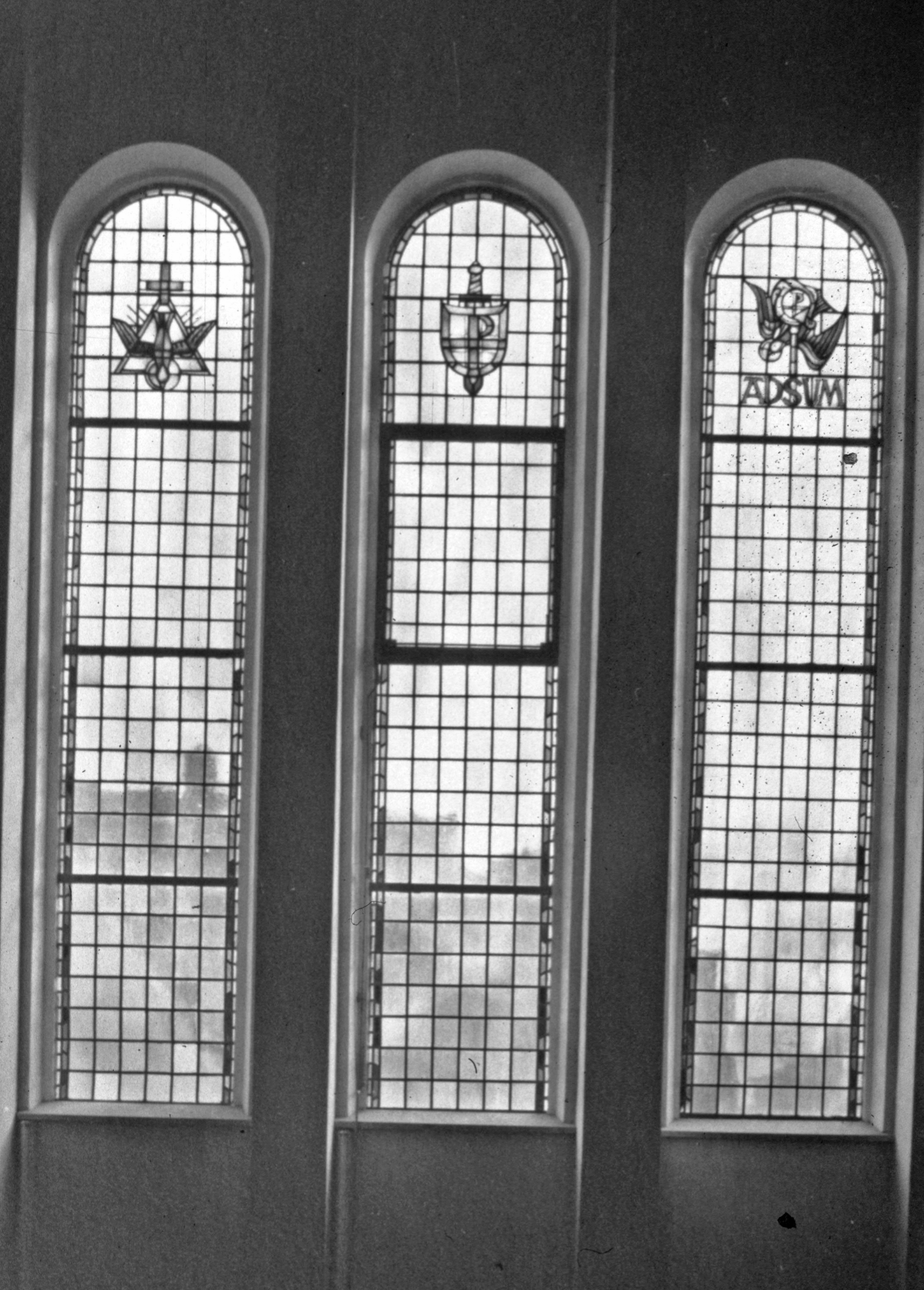 Die im Jahr 1975 ausgebauten Altarfenster befinden sich als Leigabe im Süßmuth-Museum in Immenhausen